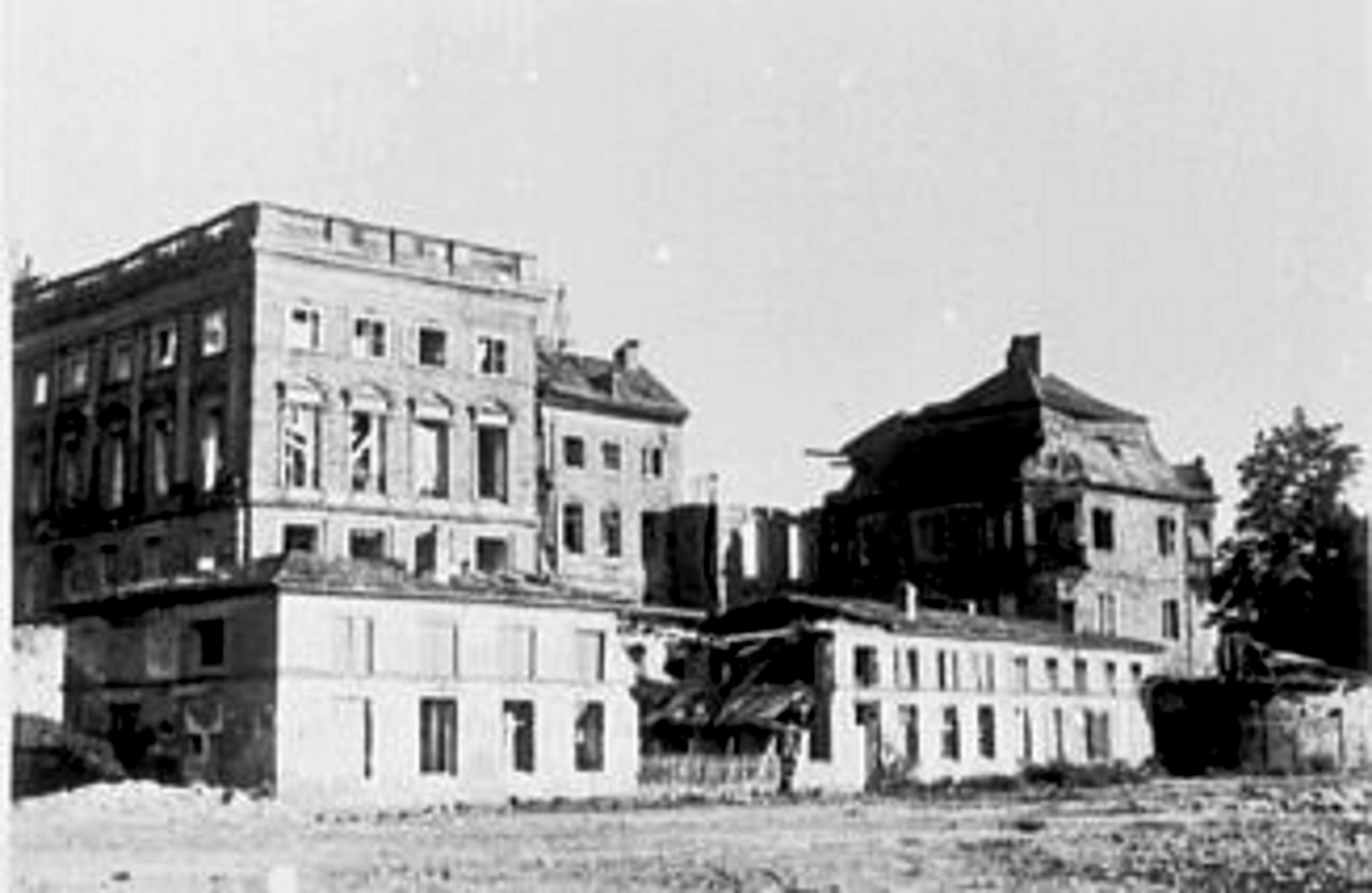 Osteiner-Bassenheimer-Dalberger Hof erbaut 1804-05 Mainseite